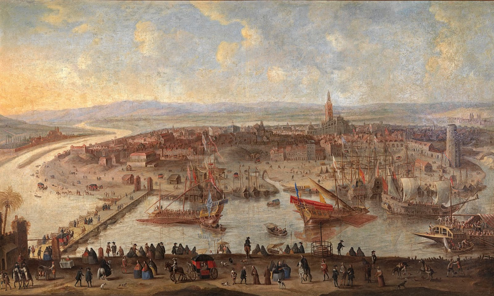 Sevilla. Óleo sobre lienzo. 163 x 274 cm. El óleo es una obra anónima aunque en el pasado se le atribuyó, sin fundamento, a Juan Bautista Martínez del Mazo. Ha sido vinculado con la colección de vistas de ciudades encargadas por Felipe IV para el heredero Baltasar Carlos. Muestra los barcos por el Guadalquivir. Es una estampa propia de Sevilla porque fue capital del comercio con América y Filipinas durante siglos.